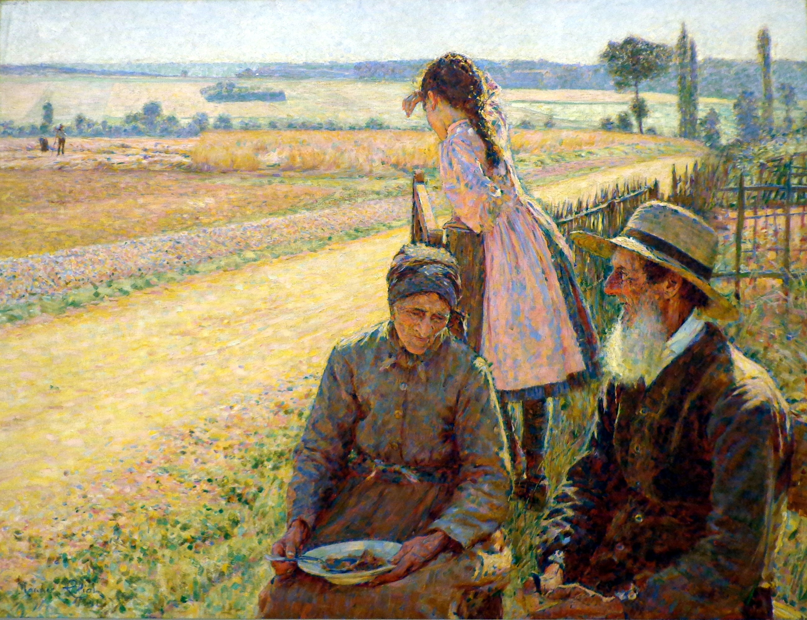 Die alten Leute, 1892